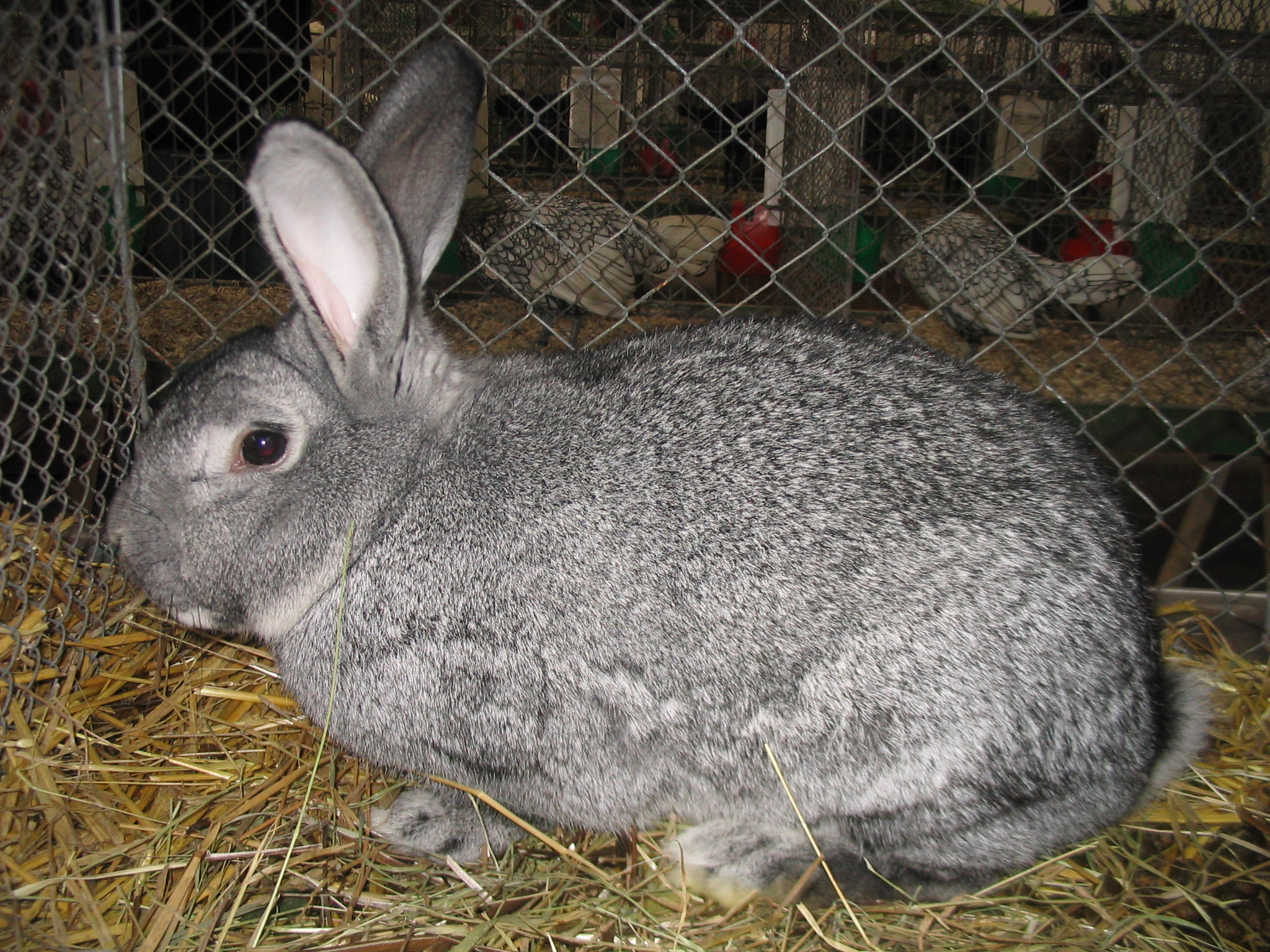 Oryctalagus cuniculus, Hauskaninchen, Domestic Rabbit, Rasse: Großchinchilla Fotografiert: 06.10.2004, Dr. Hagen Graebner